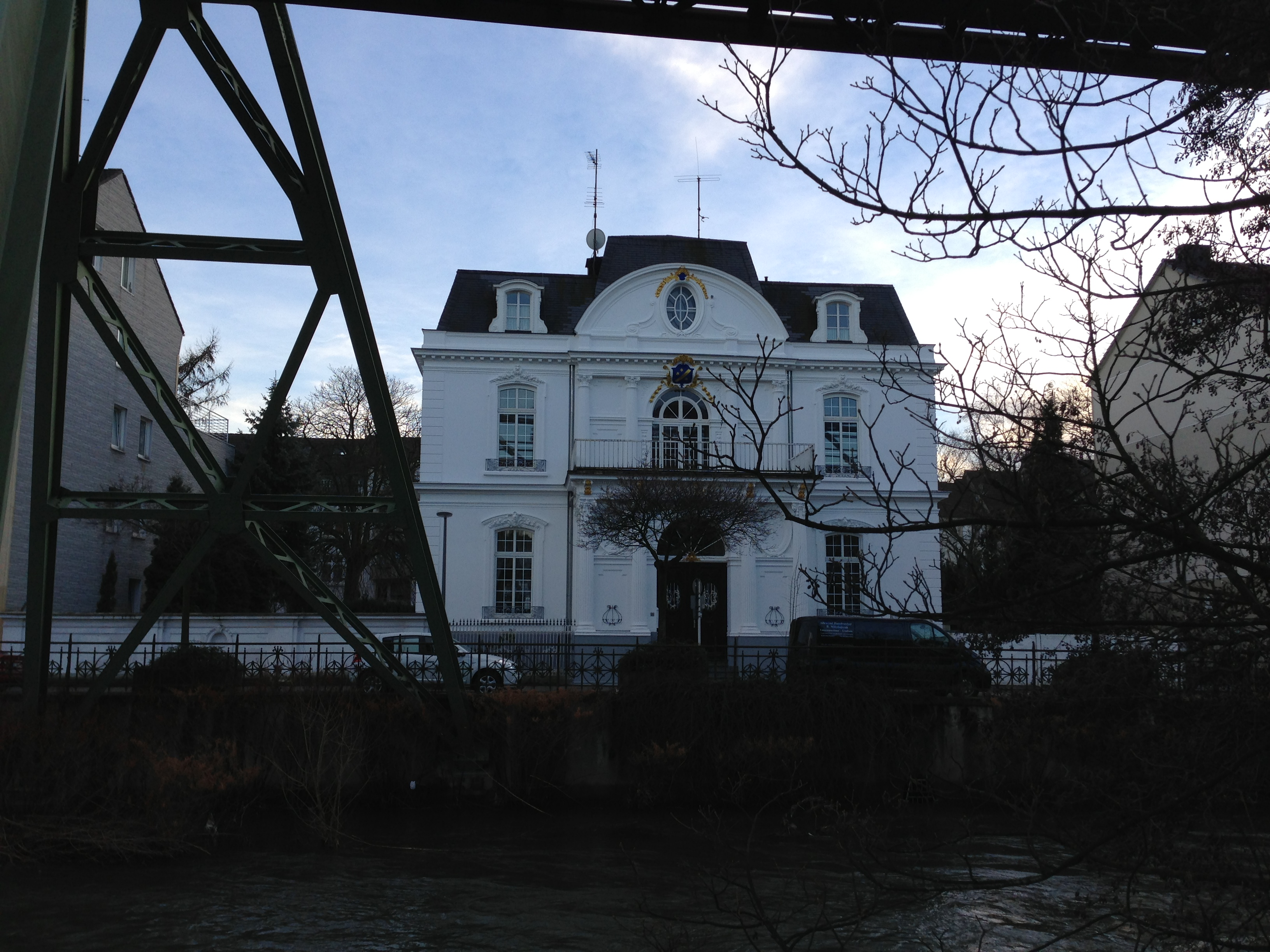 Die Villa Uferstraße 20 im neuen weißen Farbanstrich.